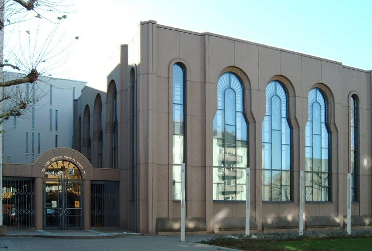 Mannheimer Synagoge 2003 selbst fotografiert